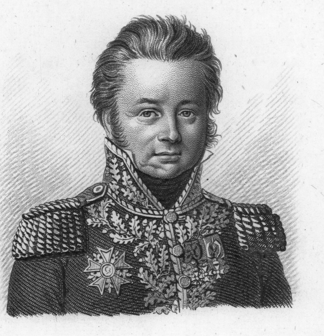 Шарль Антуан Луи Алексис Моран